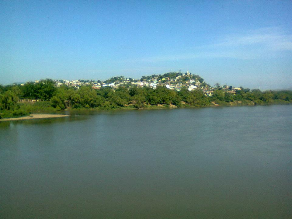 River Santiago